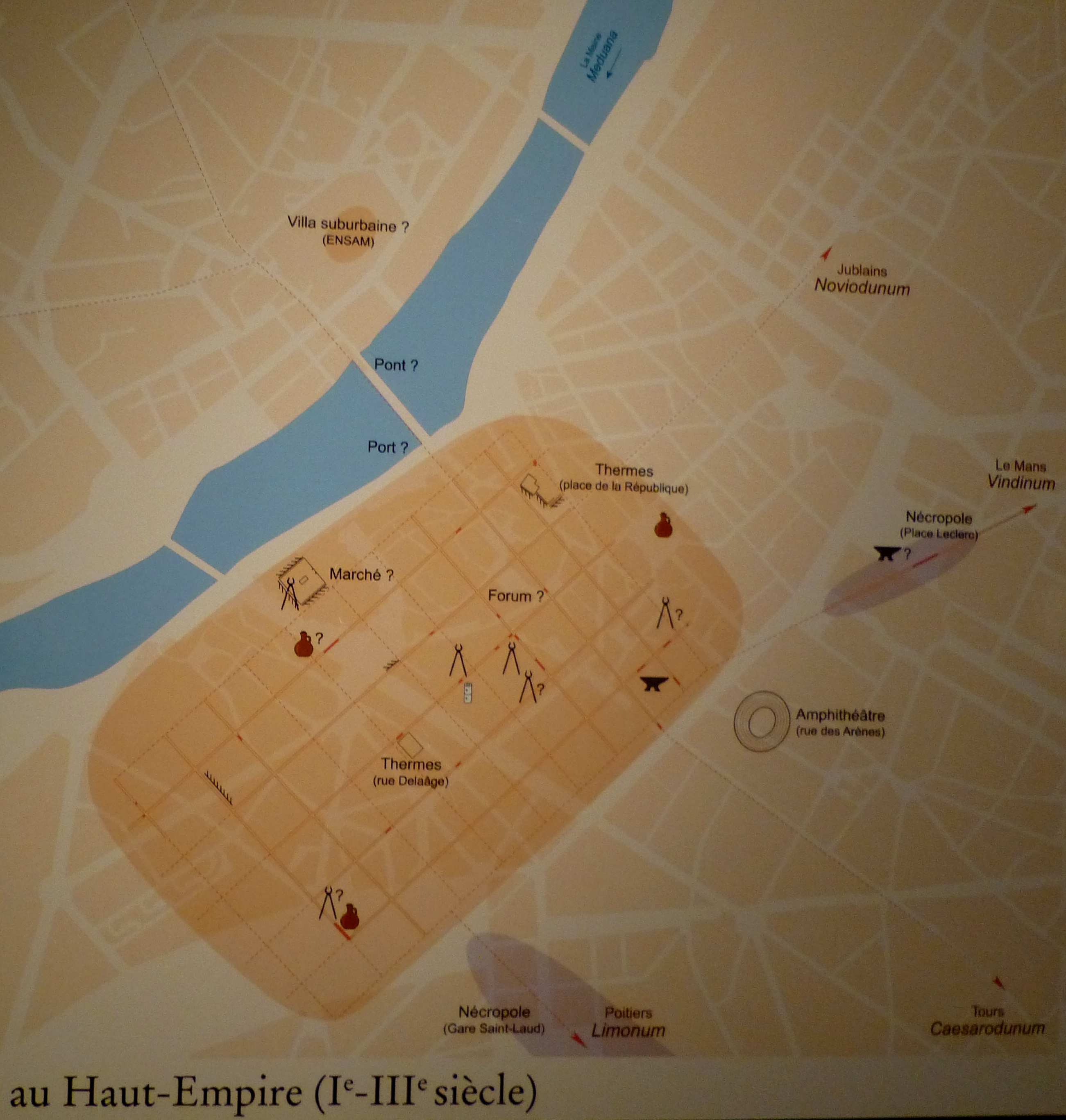 Angers, Musée des Beaux-Arts, Carte de Juliomagus au Haut-Empire.